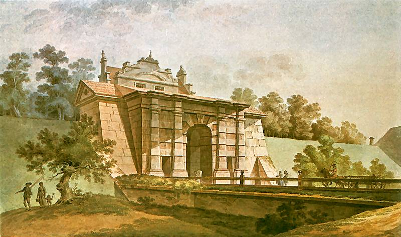 Gdańsk Stare Przedmieście, ul. Mostowa / Dolna Brama - Brama Nizinna, XVII